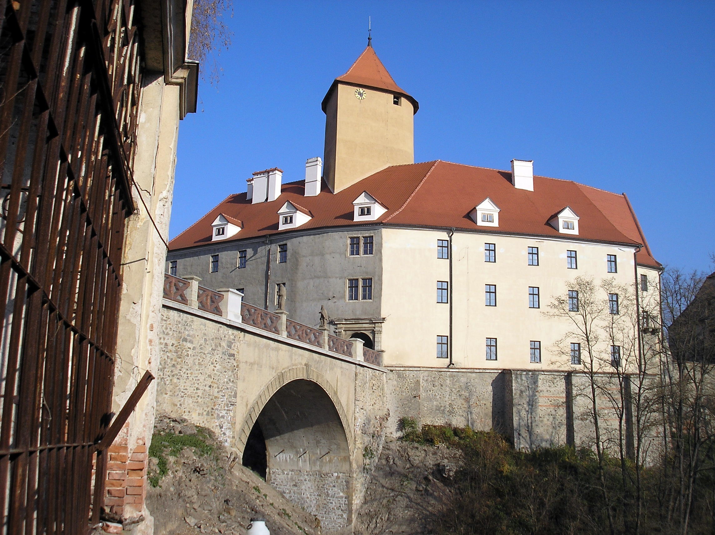 A Veveří vár az üvegház felől nézve